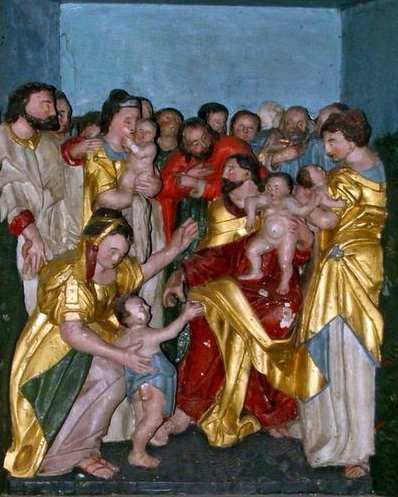 Marsow, Andachtsbild von 1580